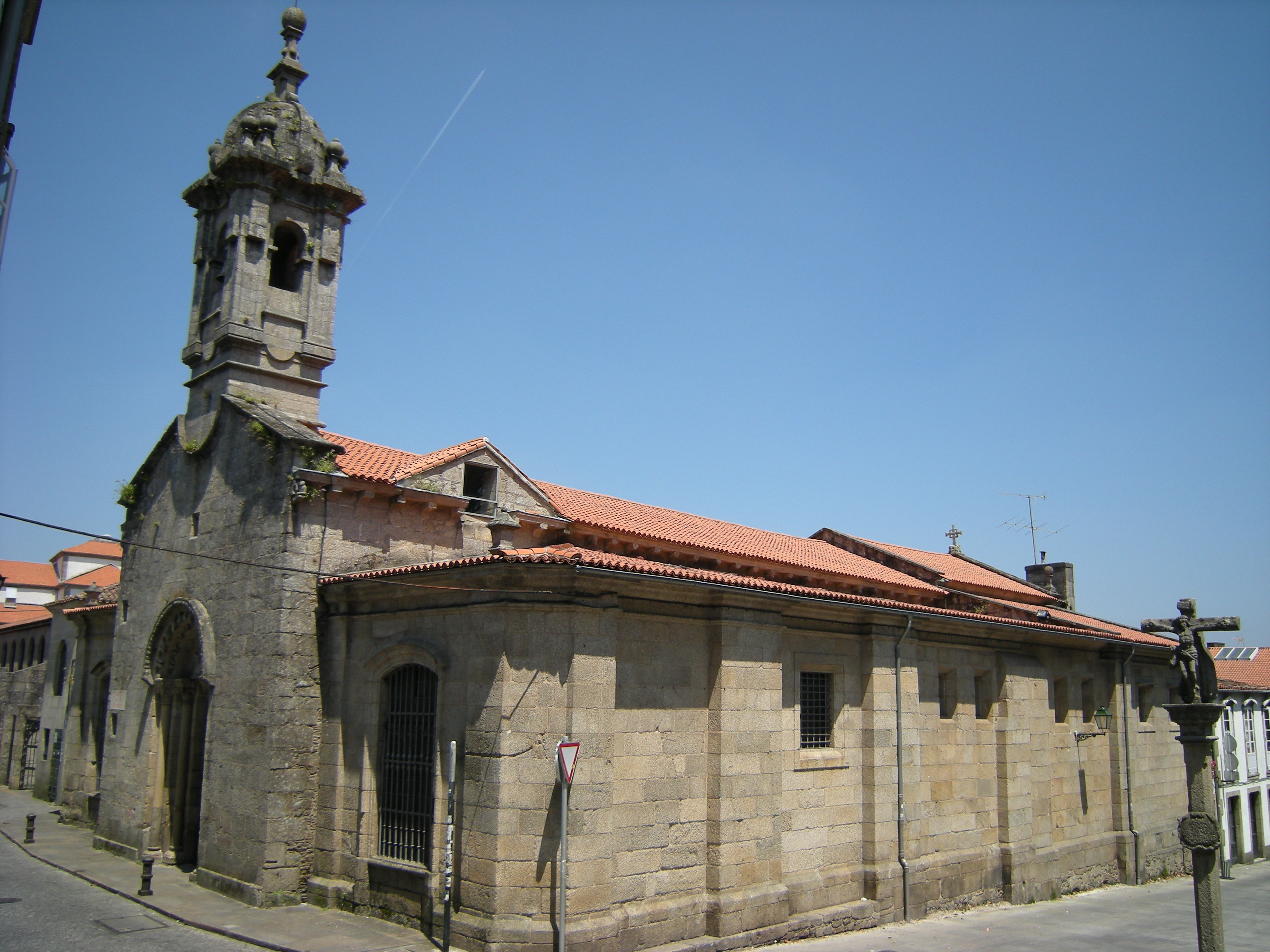 Igrexa de San Fiz de Solovio, Santiago de Compostela